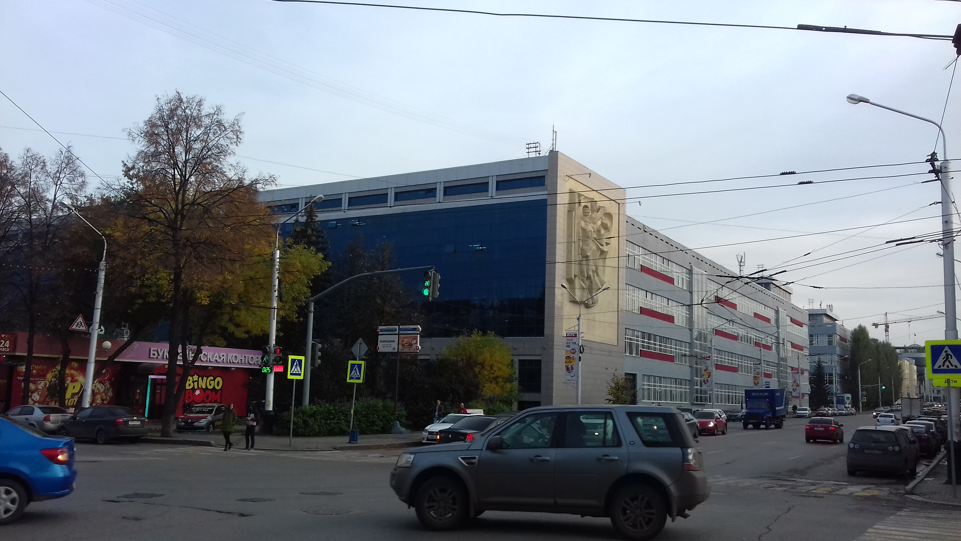 Улица Карла Маркса 12к7 в городе Уфа, Башкортостан, Россия (здание Уфимского государственного авиационного технического университета (УГАТУ)) - вид со стороны пересечения улицы Карла Маркса с Коммунистической улицей